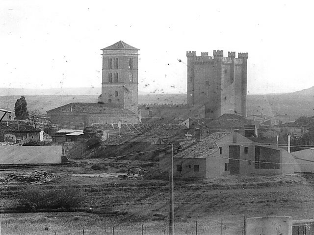 Castillo - Fuensaldaña (Valladolid) - Se observa la torre del castillo de los Vivero y a la izquierda la iglesia del siglo XVI. - Fotografía. Papel 105 x 74 Sepia